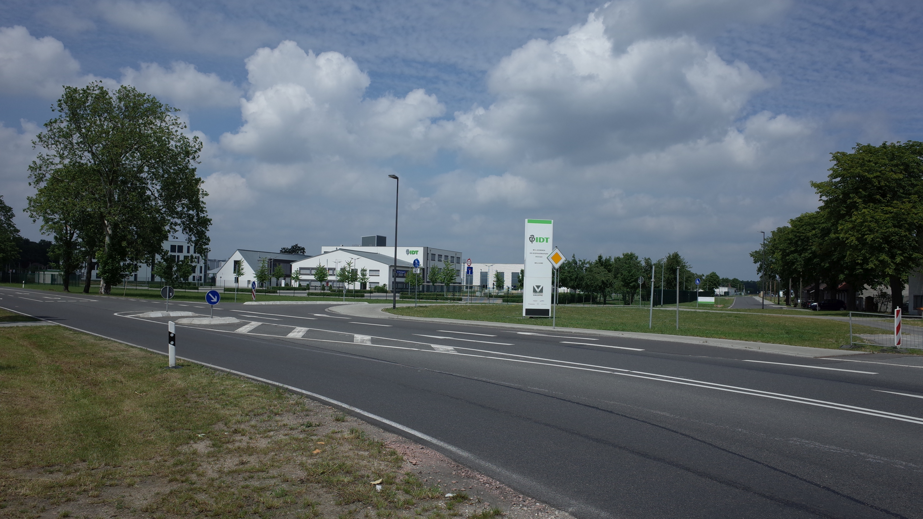 Stadt Dessau-Roßlau, Rodleben Ortsteil Tornau. Neue Straße zur IDT Biologika.